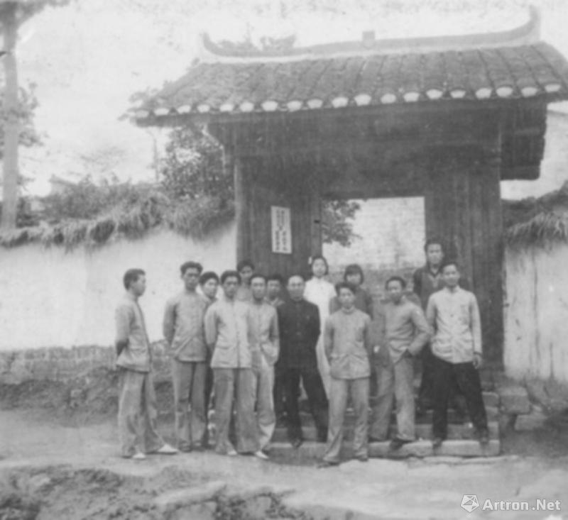 Équipe de peintre de propagande contre les ennemis (Japonais pendant l'invasion de la Chine par l'Empire du Japon).